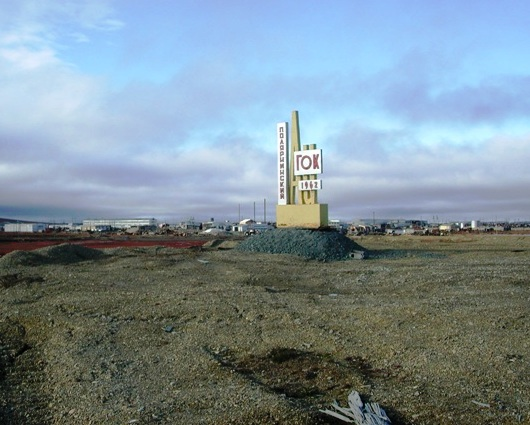 Стела на въезде в посёлок Полярный